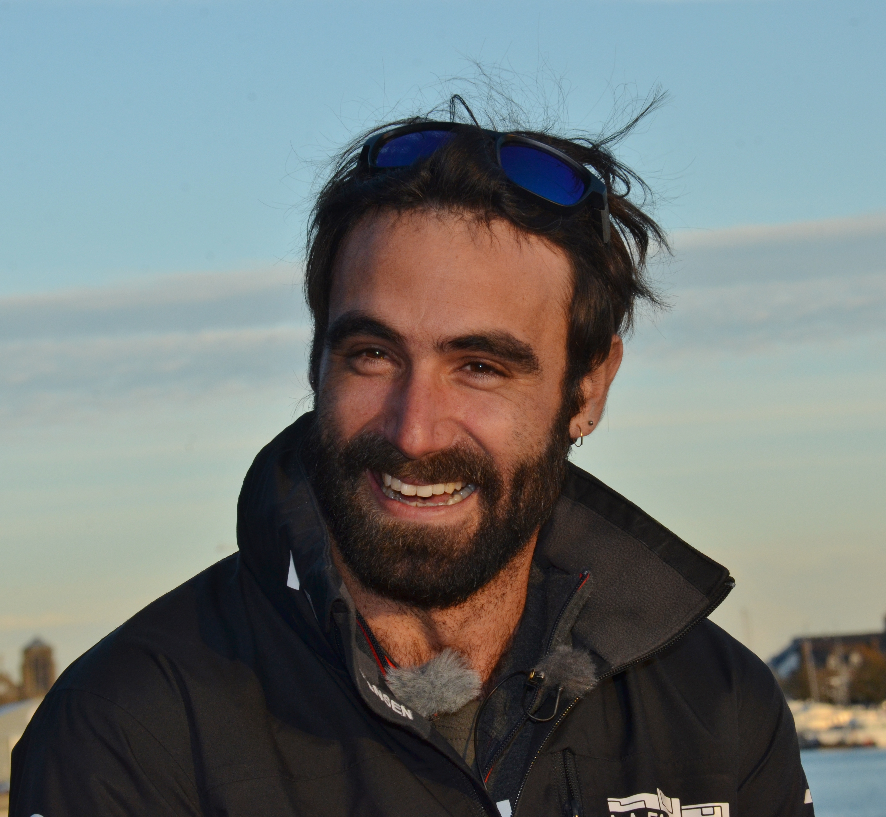 Alan Roura au départ de la Route du Rhum 2018